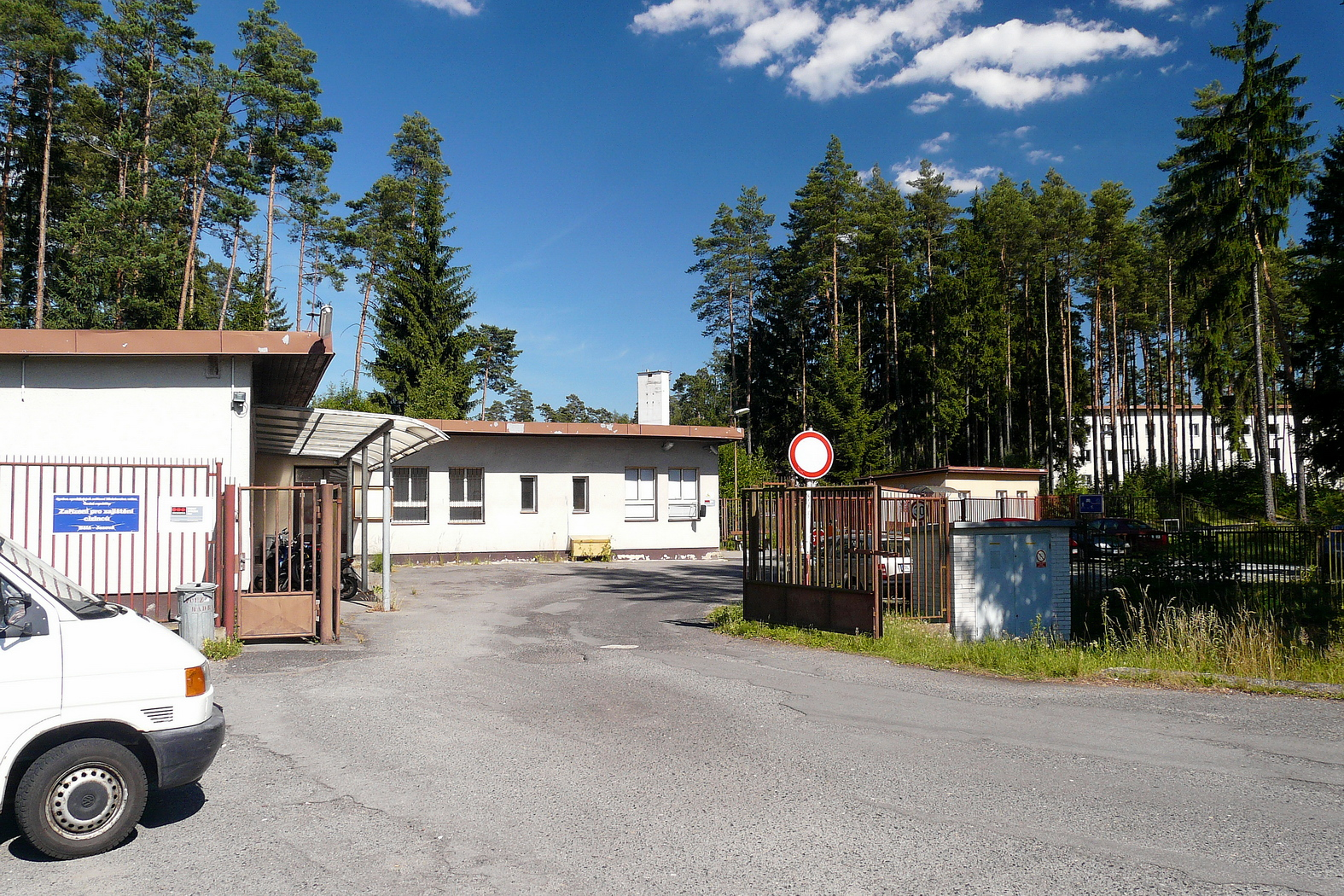 Uprchlický tábor Bělá-Jezová